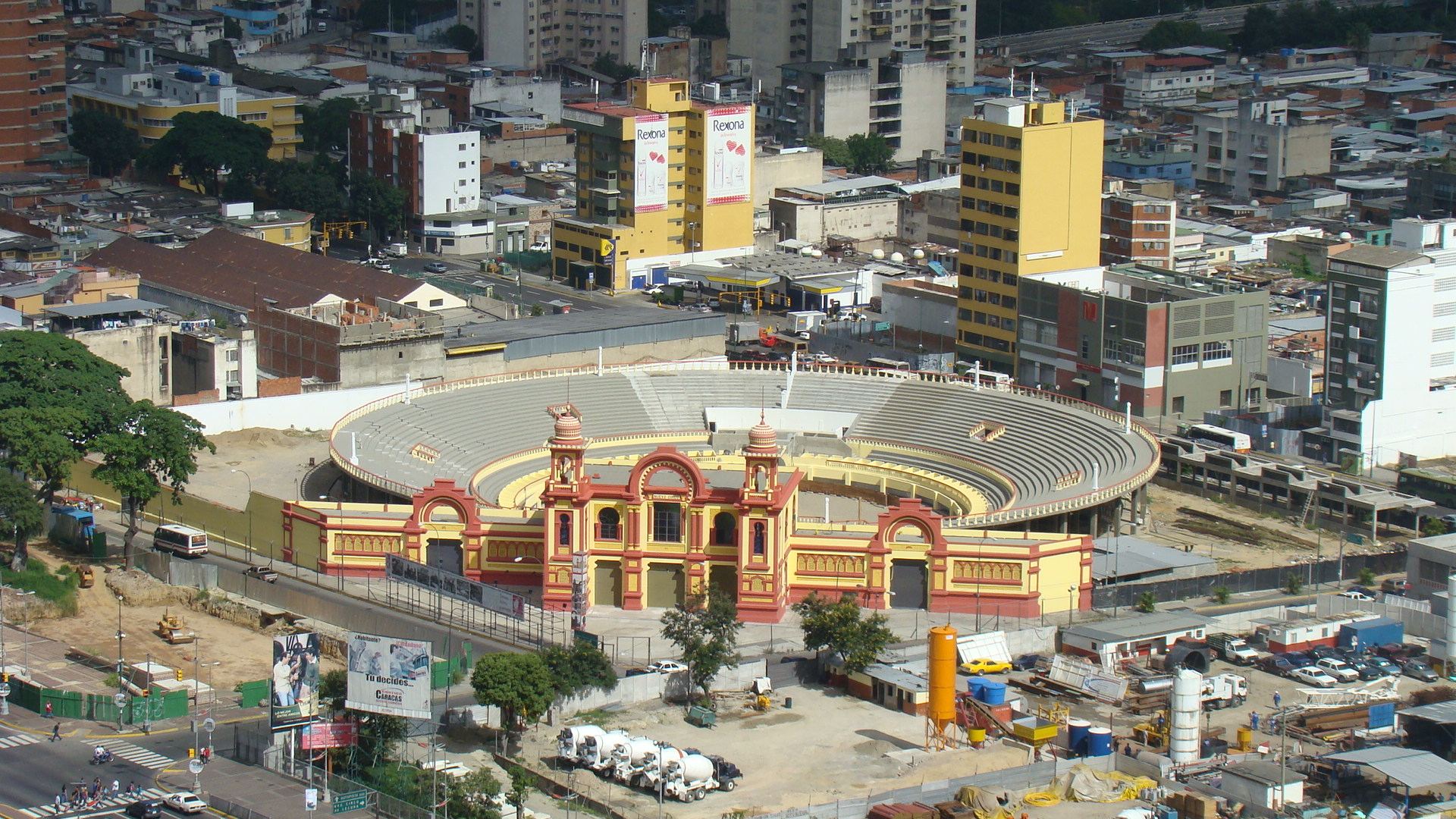 Edificación del Nuevo Circo de Caracas